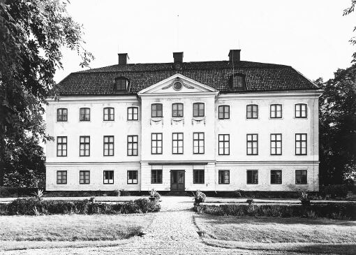 Erstaviks huvudbyggnad - baksidan. Byggnaden, ritad av den gustavianska tidens ledande arkitekt Jean Eric Rehn, uppfördes på 1760-talet.